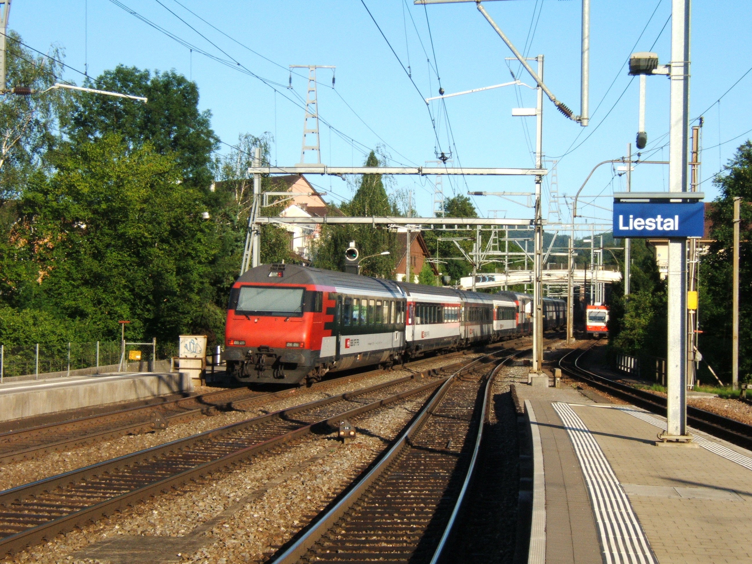 Vertrekkende Waldenburgerbahn trein in Liestal